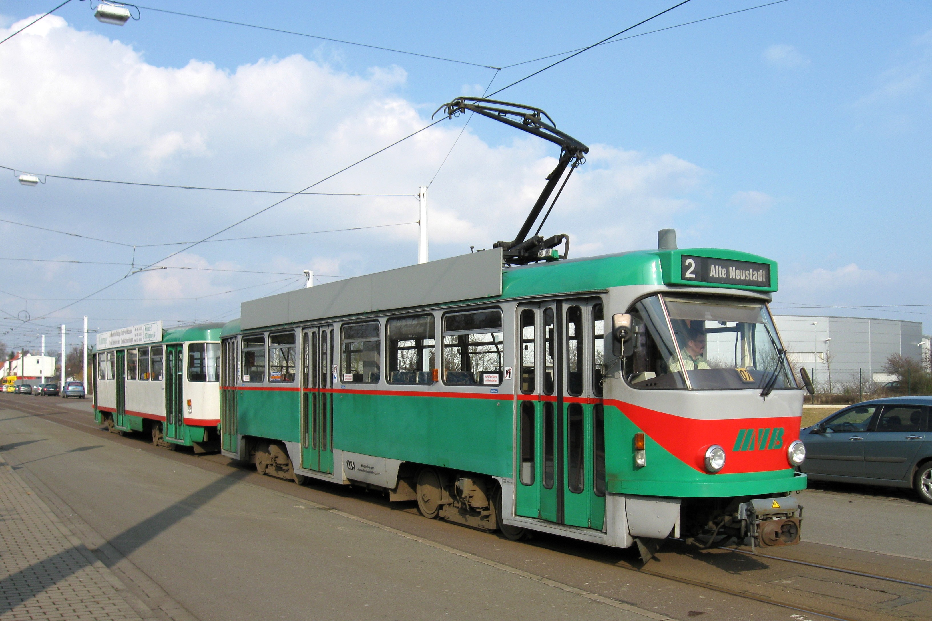 Magdeburg: Ein Tatra mit Beiwagen am Betriebshof Westerhüsen